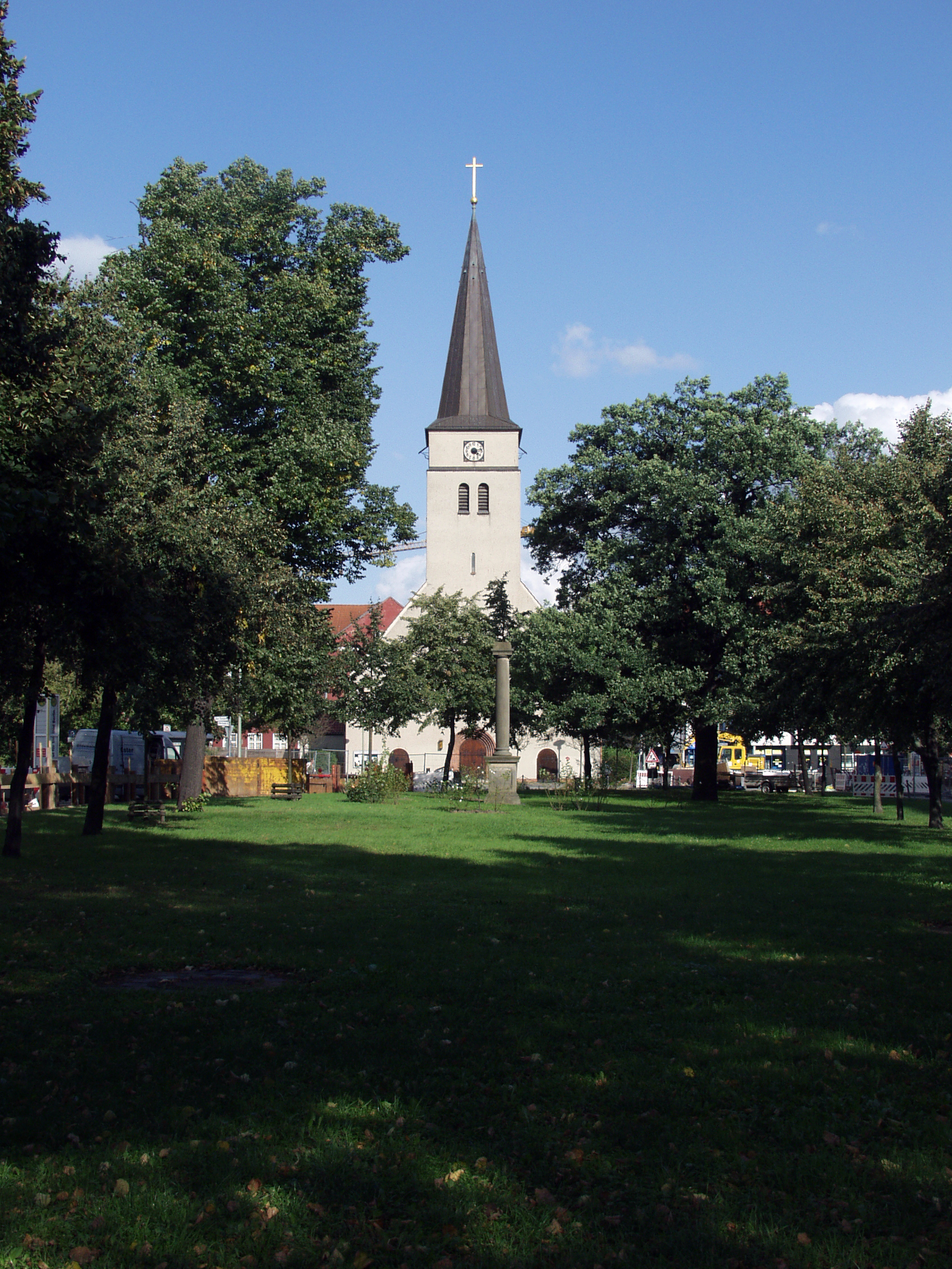 Kirche Friedrichsfelde mit Preußensäule im Vordergrund. Alfred-Kowalke-Straße DenkmalNr : 09040146 , 09040147